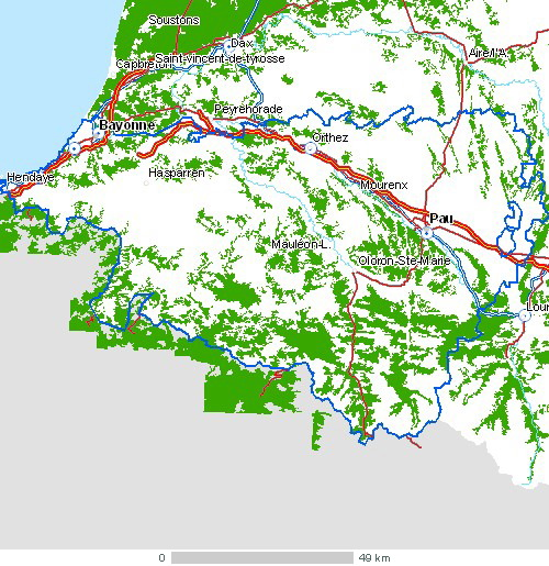 Carte du département Pyrénées-Atlantiques Légende